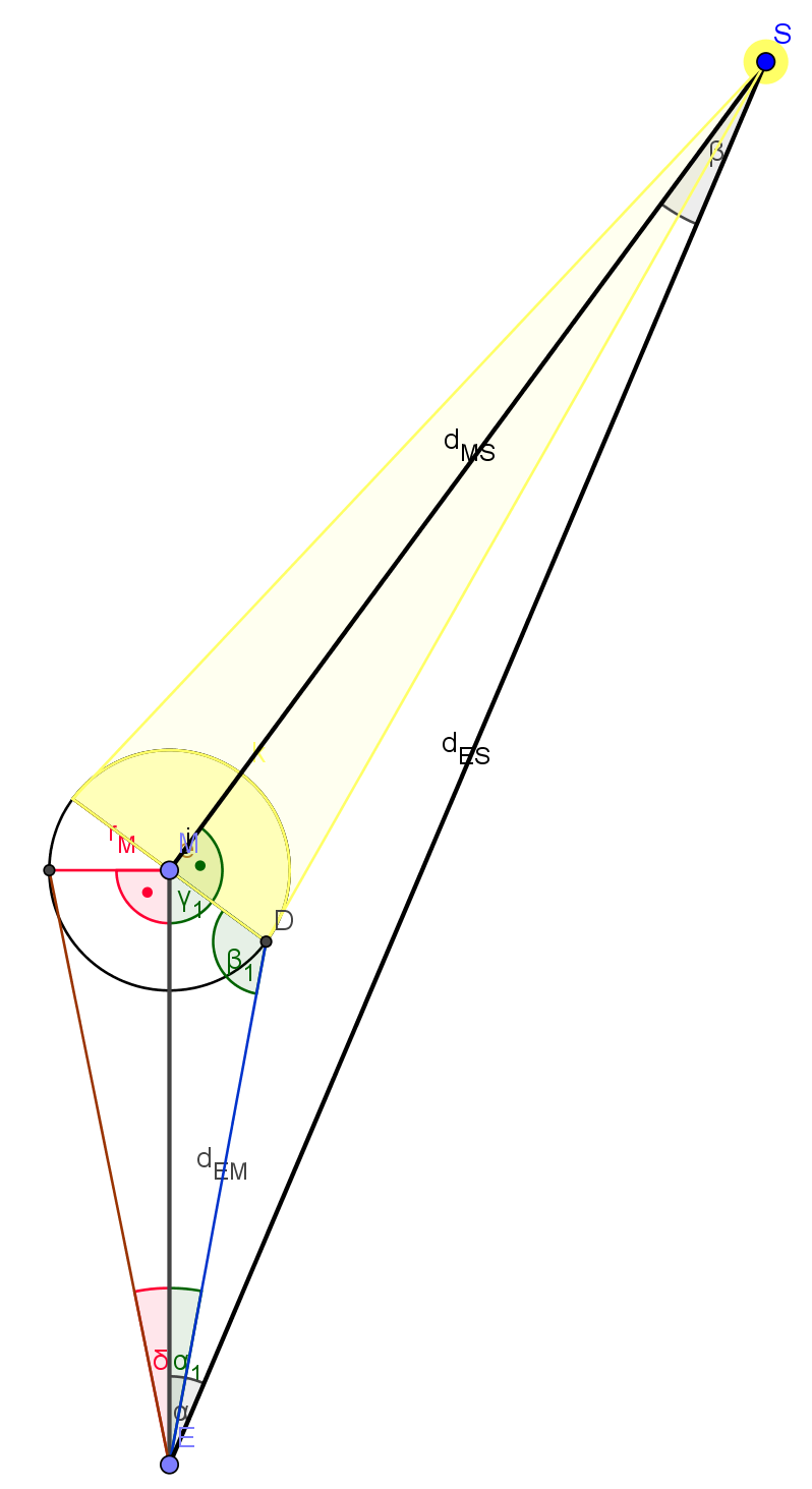 GeoGebra-Skizze zur Berechnung des Verhältnisses der Sonnen- zur Mond-Entfernung aus der Form der Mondsichel.